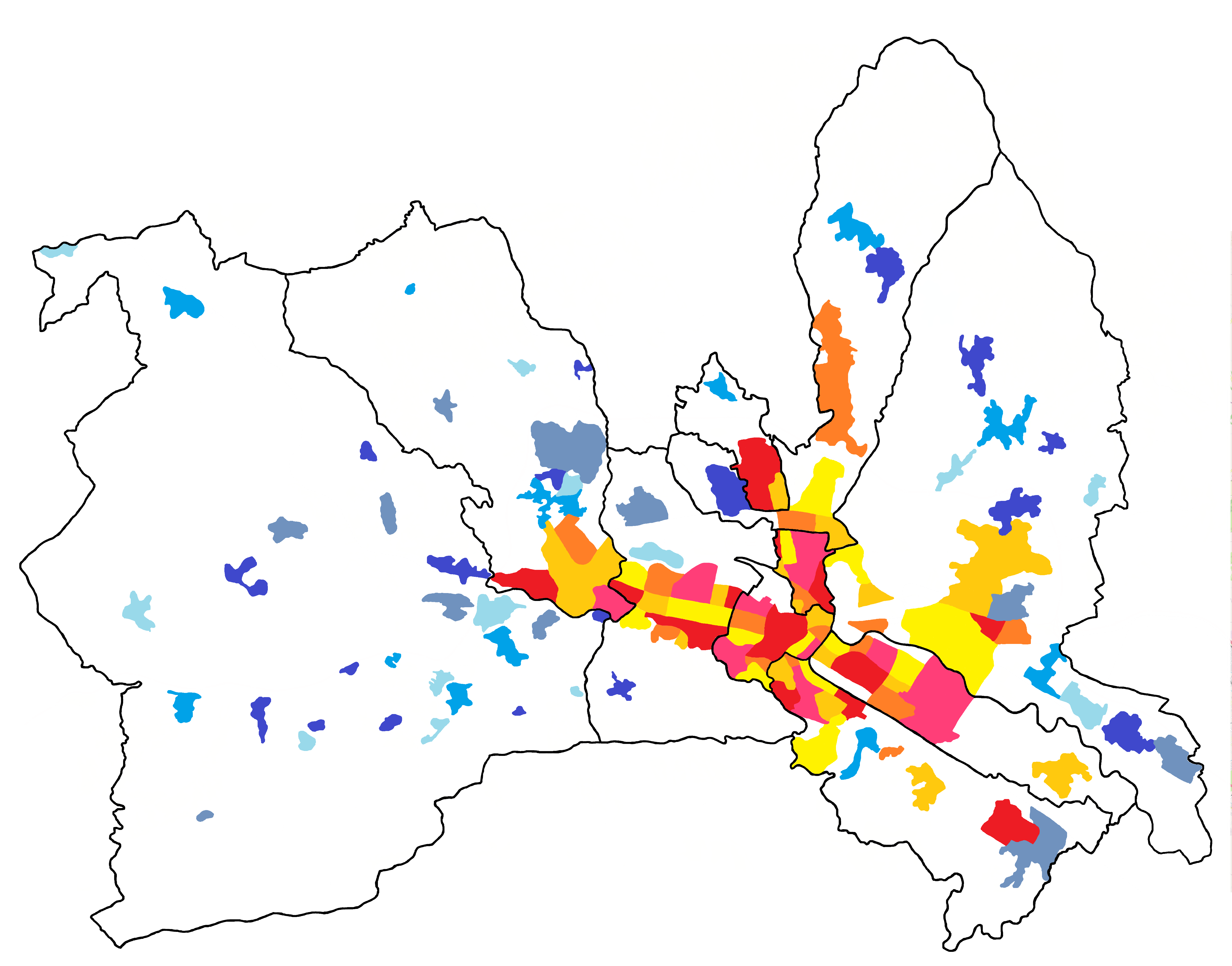 Детален приказ на сите градски, приградски и рурални населени места на ниво на Град Скопје